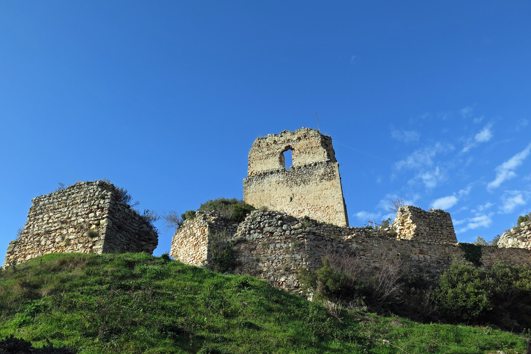 Castillo de Lanos en el pueblo de Ocio, provincia de Álava (España), torre de homenaje y muralla principal